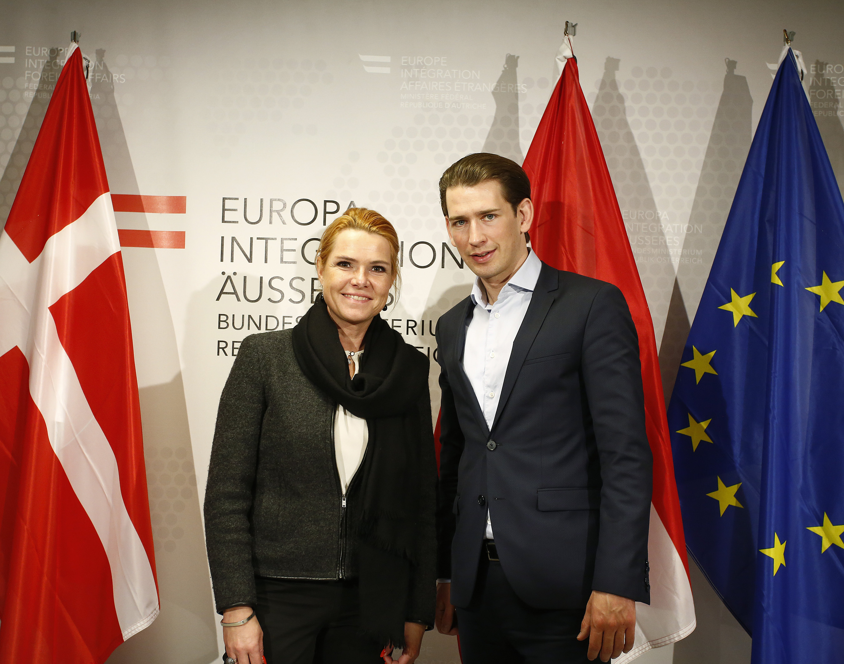 Bundesminister Sebastian Kurz trifft die dänische Integrationsministerin Inger Stojberg. Besuch des Integrationszentrum des Österreichischen Integrationsfonds. Wien, 30.11.2016, Foto: Dragan Tatic